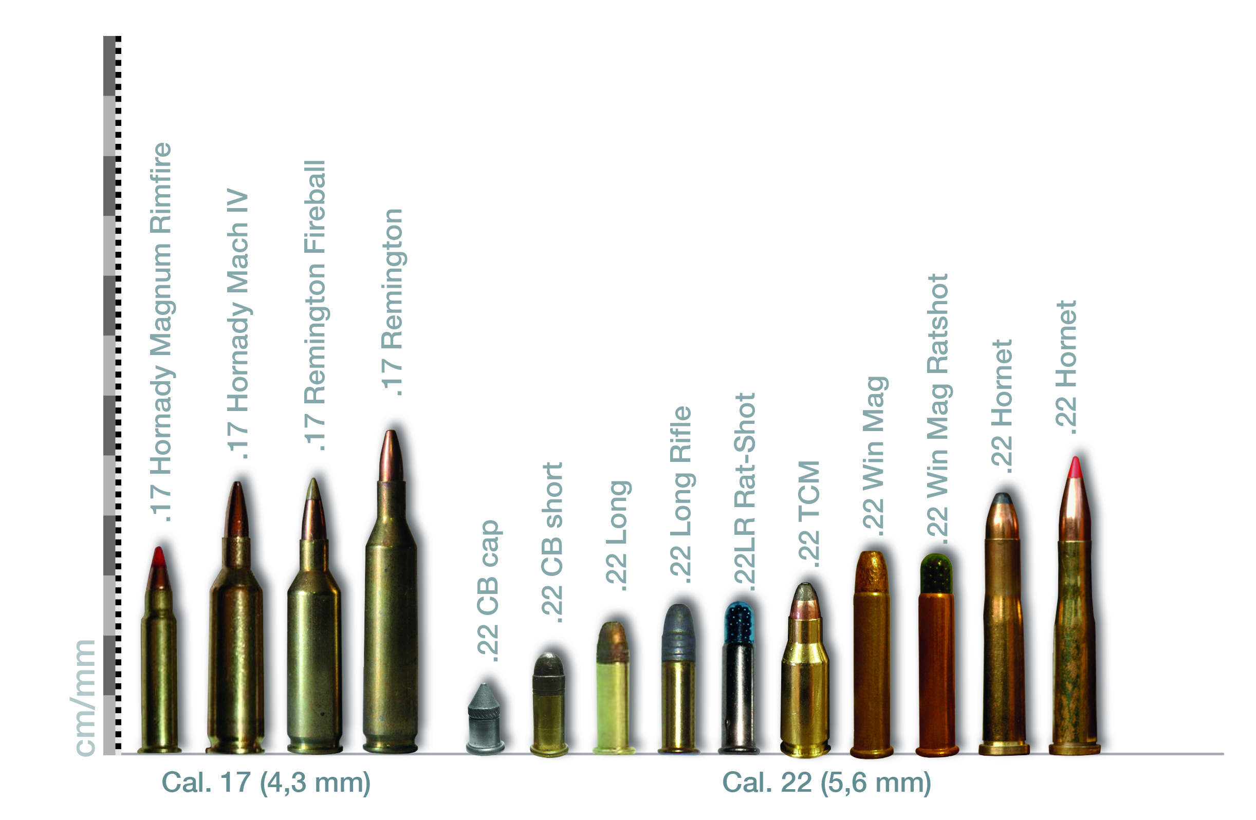 Display verschiedener Kleinkaliber-Patronen .17 und .22